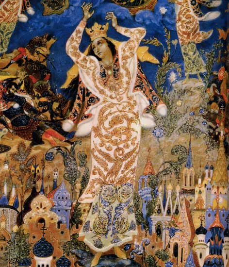 "Плач Ярославны" - миниатюра на шкатулке